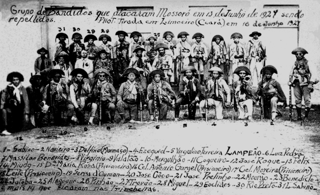 Os cangaceiros acima foram nominados por Jararaca, a quem a fotografia foi mostrada enquanto ele convalescia, preso em Mossoró, pouco antes de morrer